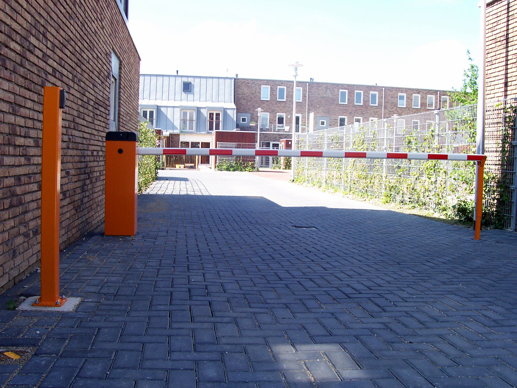 Kaartlezer bij eenslagboom